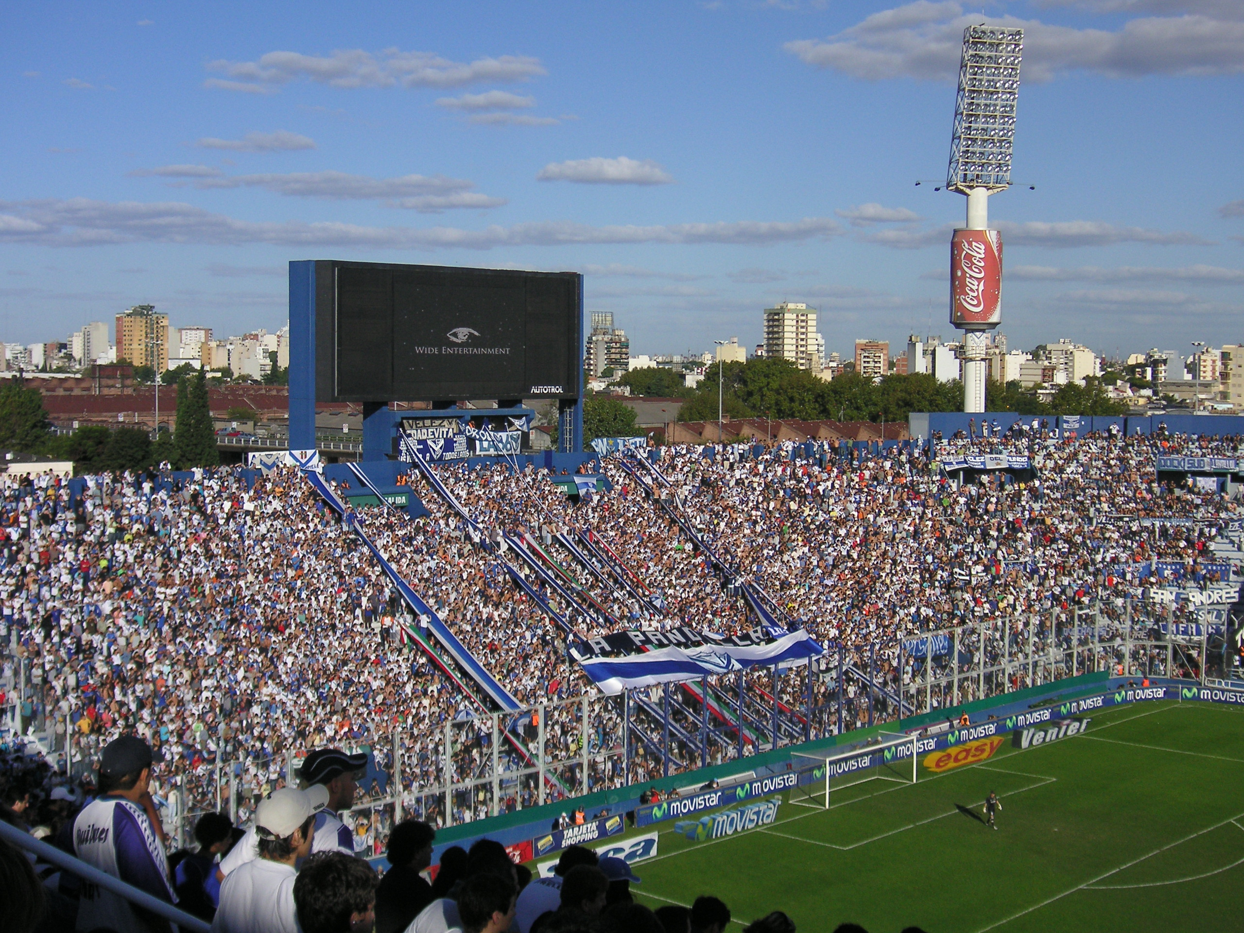 Estadio José Amalfitani (Club Atlético Vélez Sársfield), Buenos Aires, Argentina.